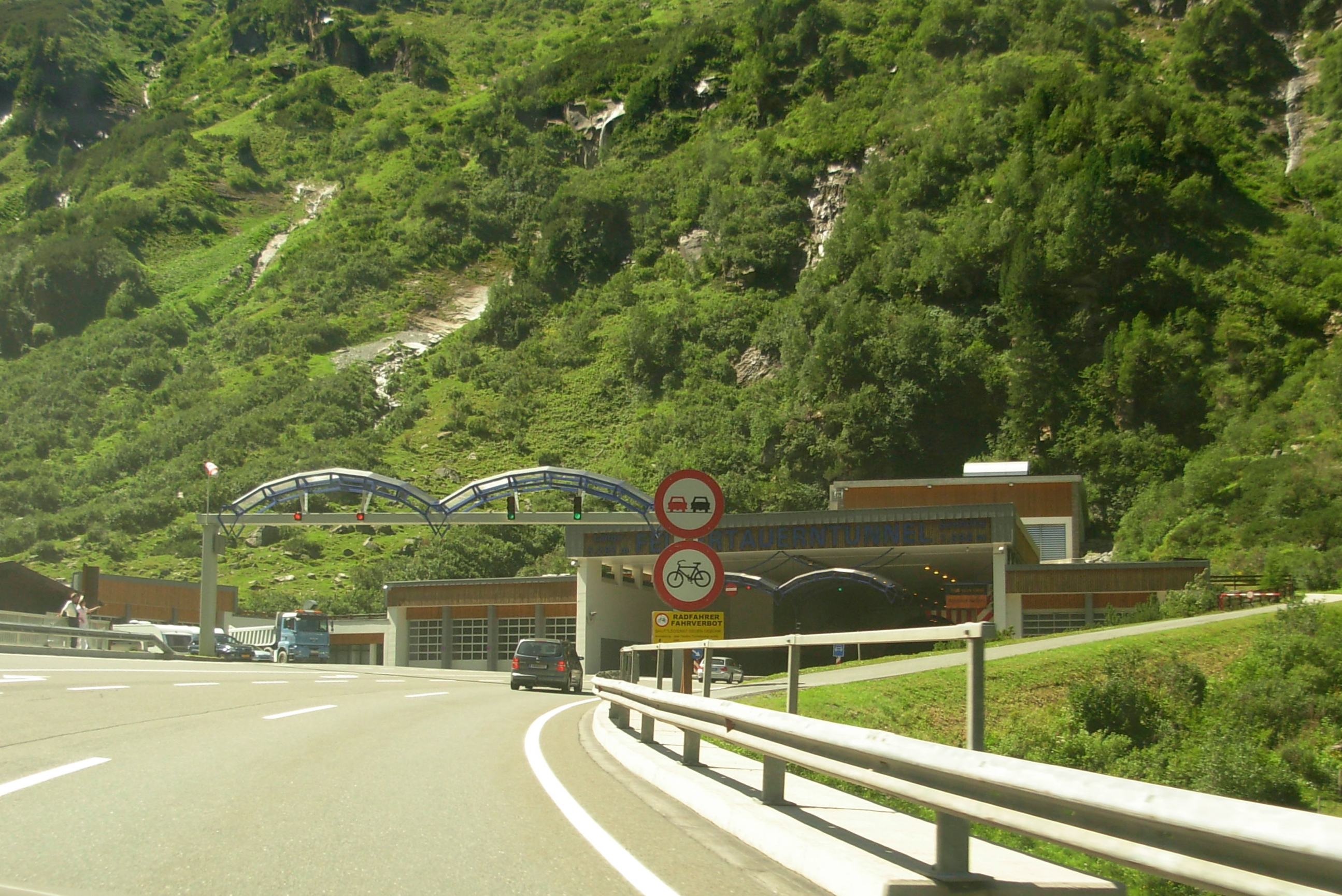 Šiaurinis įvažiavimas į Felbertauerno tunelį